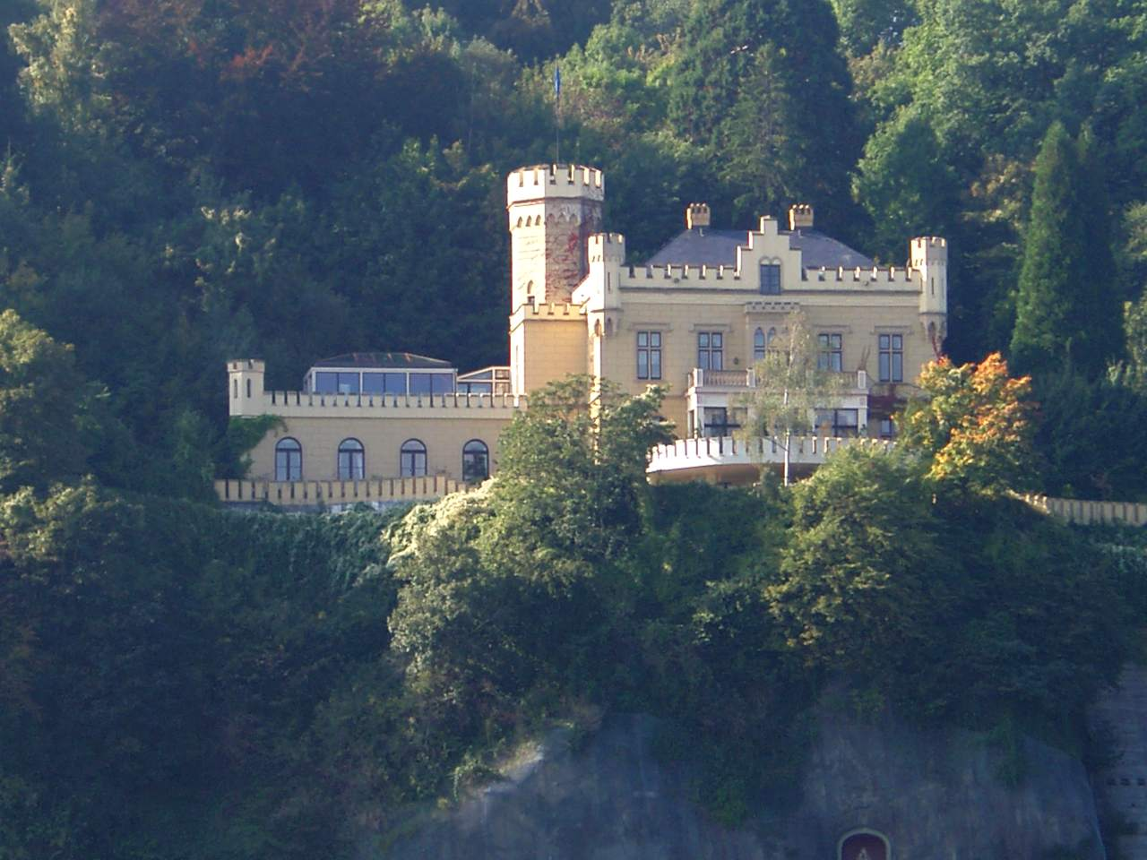 Schloss Marienfels